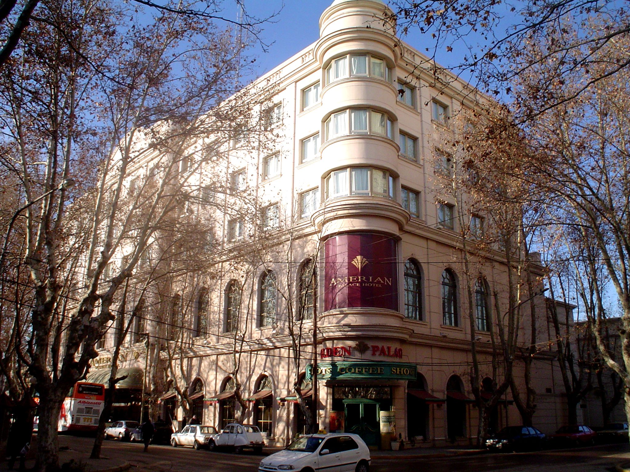 Epic Hotel Villa Mercedes (desde el 2004 hasta el 2015, Amerian Palace Hotel & Casino). León Guillet 71, Villa Mercedes, Prov. de San Luis, Argentina.